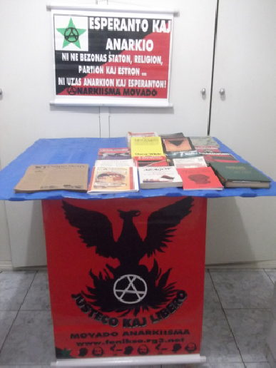 Banca para materiais anarquistas e esperanto.